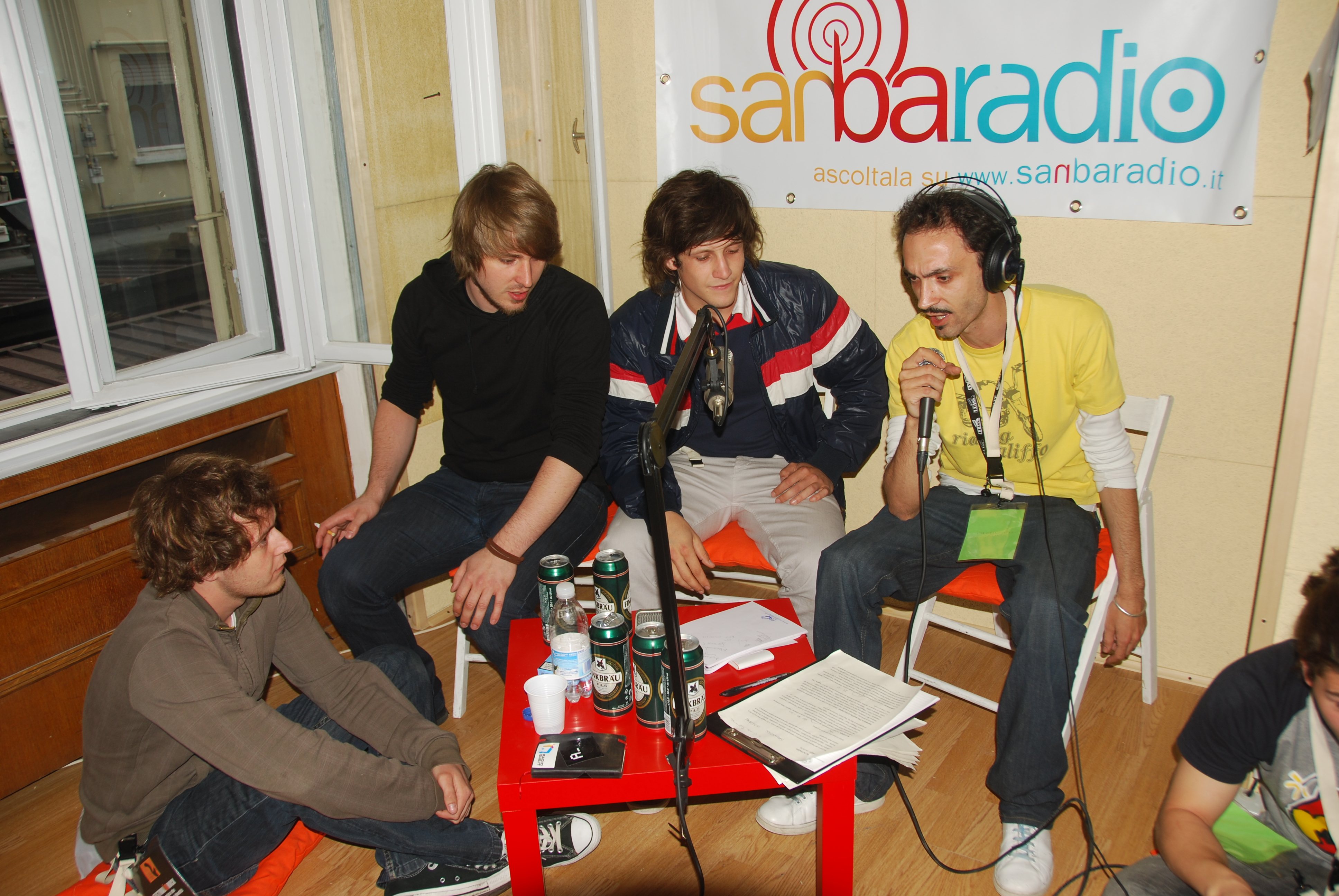 I Bastard nello studio di SanbaRadio. Il gruppo era a Trento per FestivalInRock, nell'ambito del Festival dell'Economia.